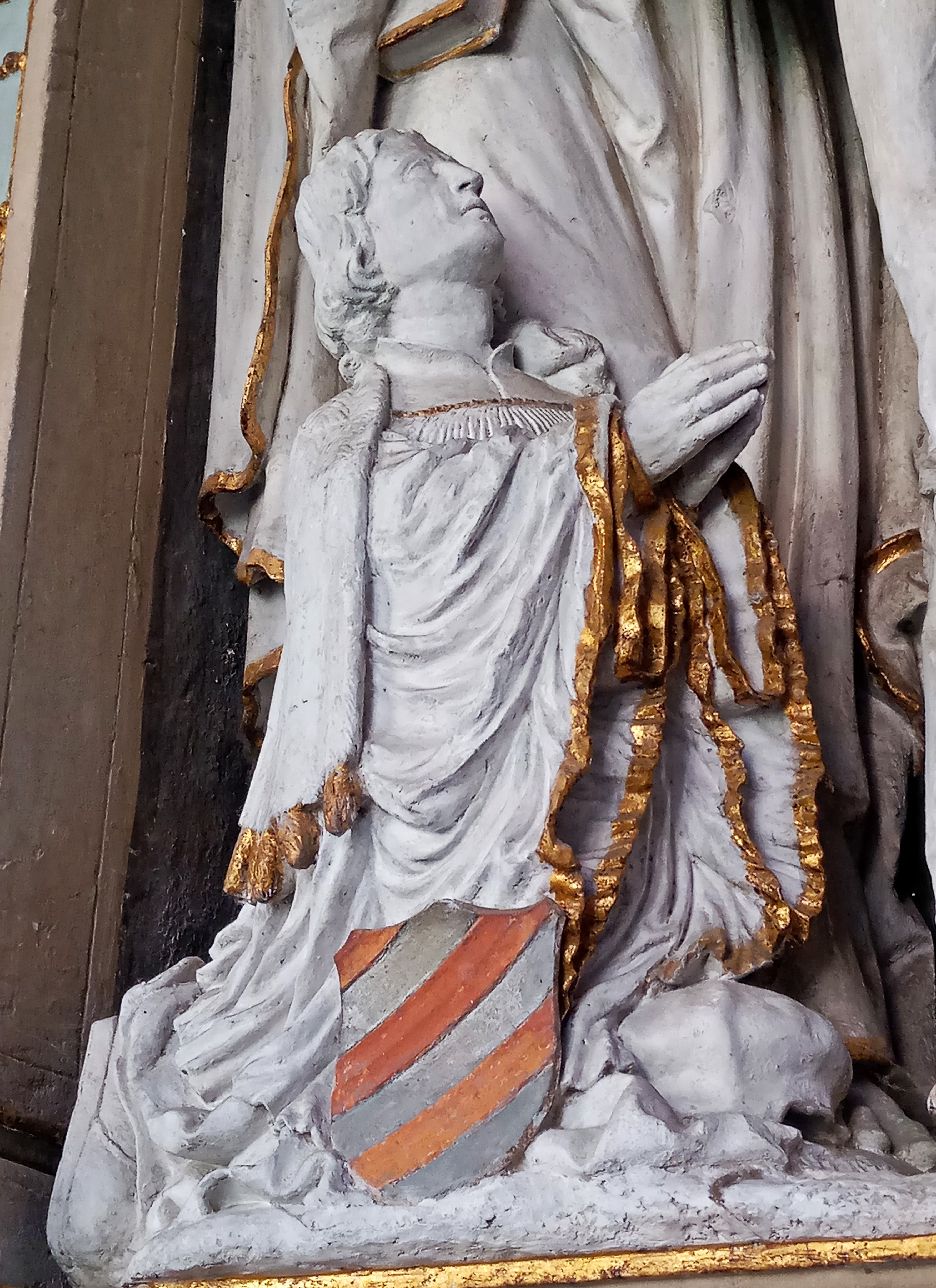 Mainzer Dom, Kreuzgang, Ausschnitt vom Grabmal des Domherrn Johann von Hattstein (+ 1518)